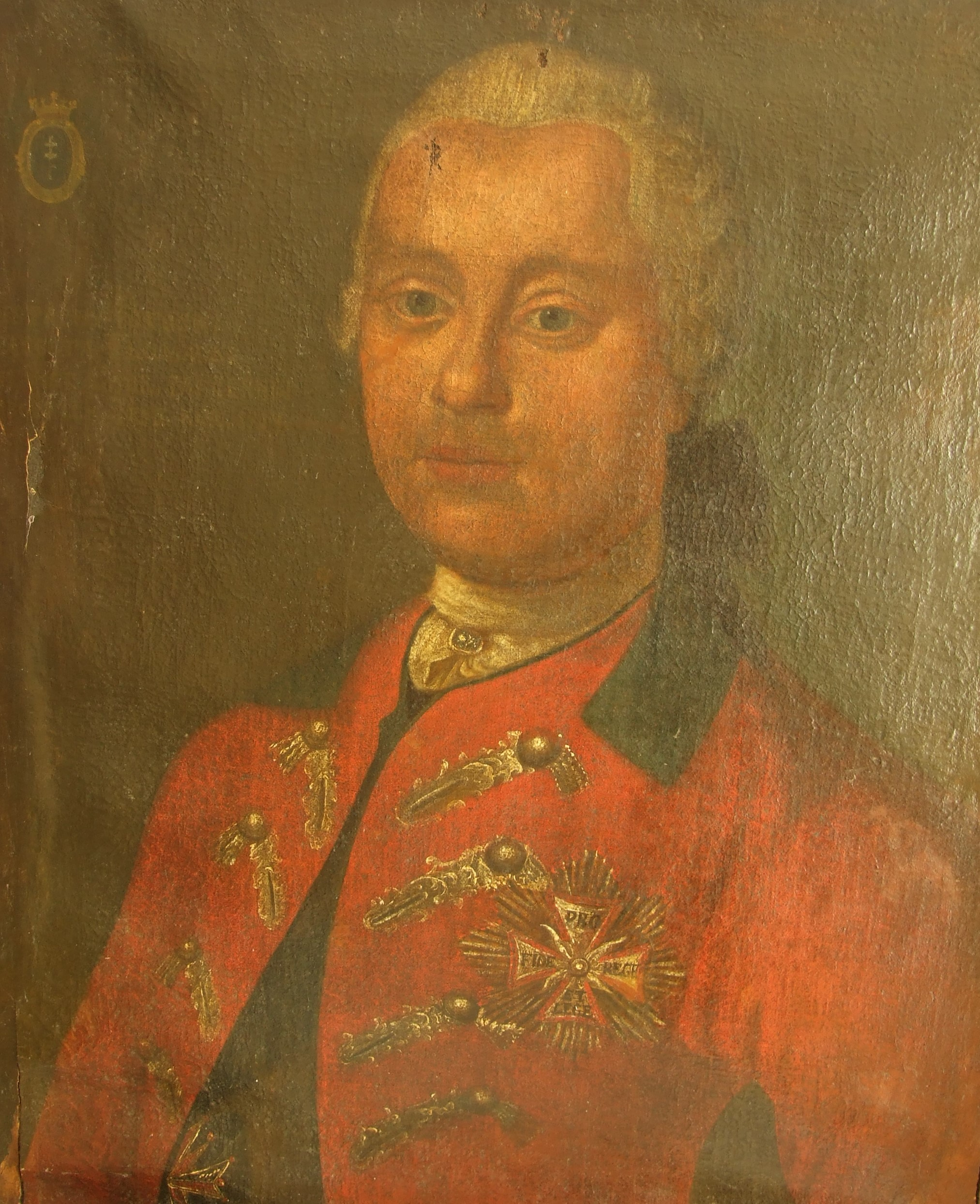 Fotografia portretu E. Potockiego . Oryginał portretu - archiwum rodziny Mysłowskich.